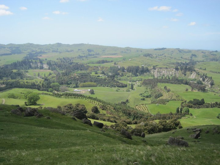 Took myself